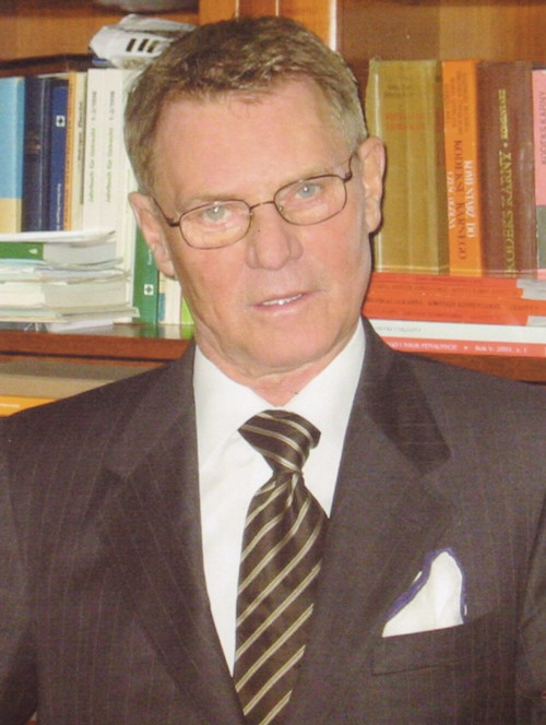 profesor Tomasz Kaczmarek